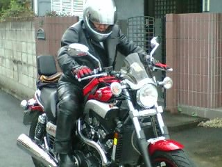 第二段ﾛｰﾄﾙﾗｲﾀﾞｰ(V-MAX1200cc)を駆る